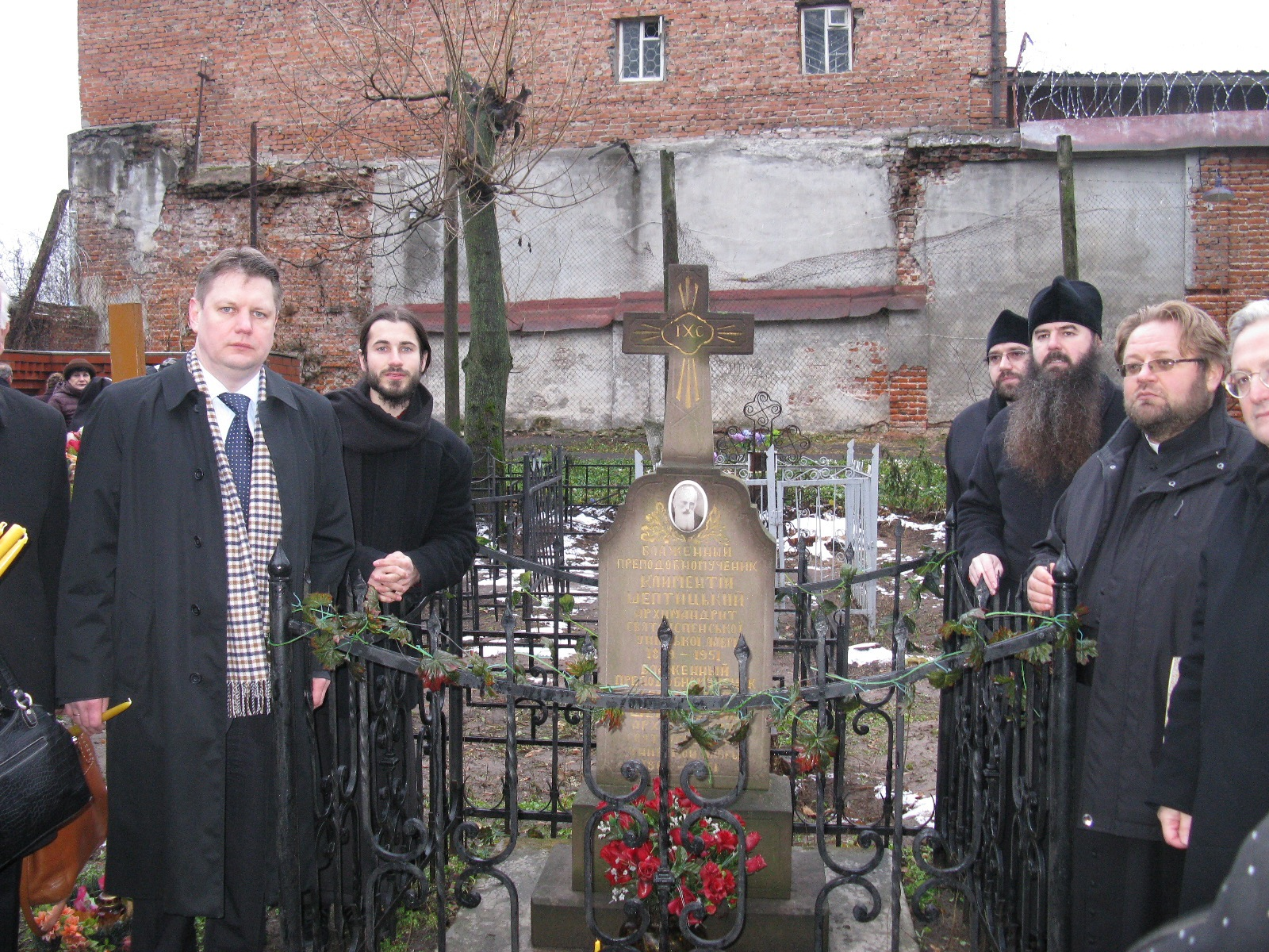 Символічна могила (кенотаф) Климентія Шептицького на Князь-Владимирському цвинтарі у Владимирі (під час церемонії відкриття меморіальної дошки Климентію Шептицькому за участі Тимчасового повіреного у справах України в Росії Вячеслава Яцюка)